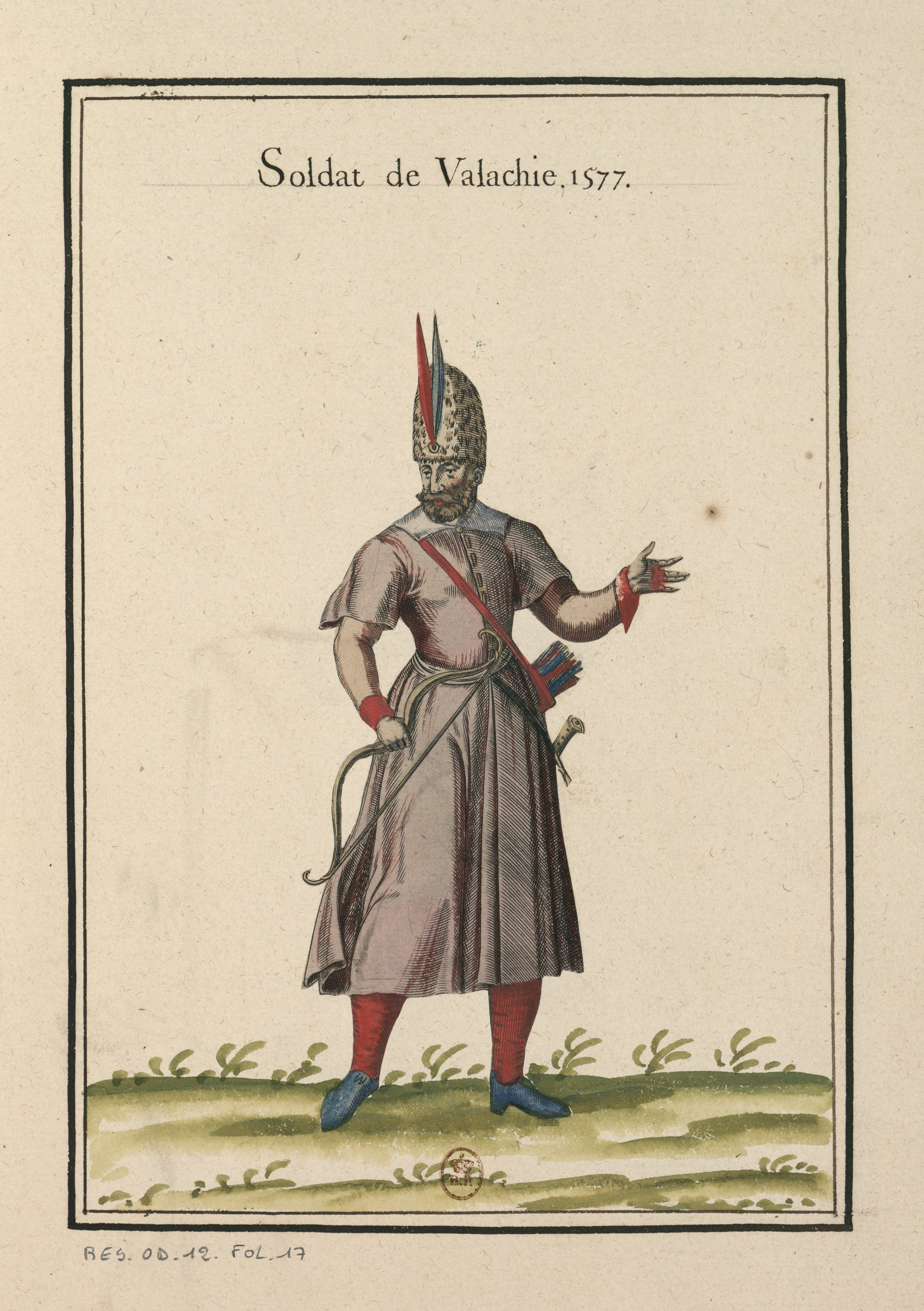 Ensemble de gravures de costumes de Turquie du XVIe siècle